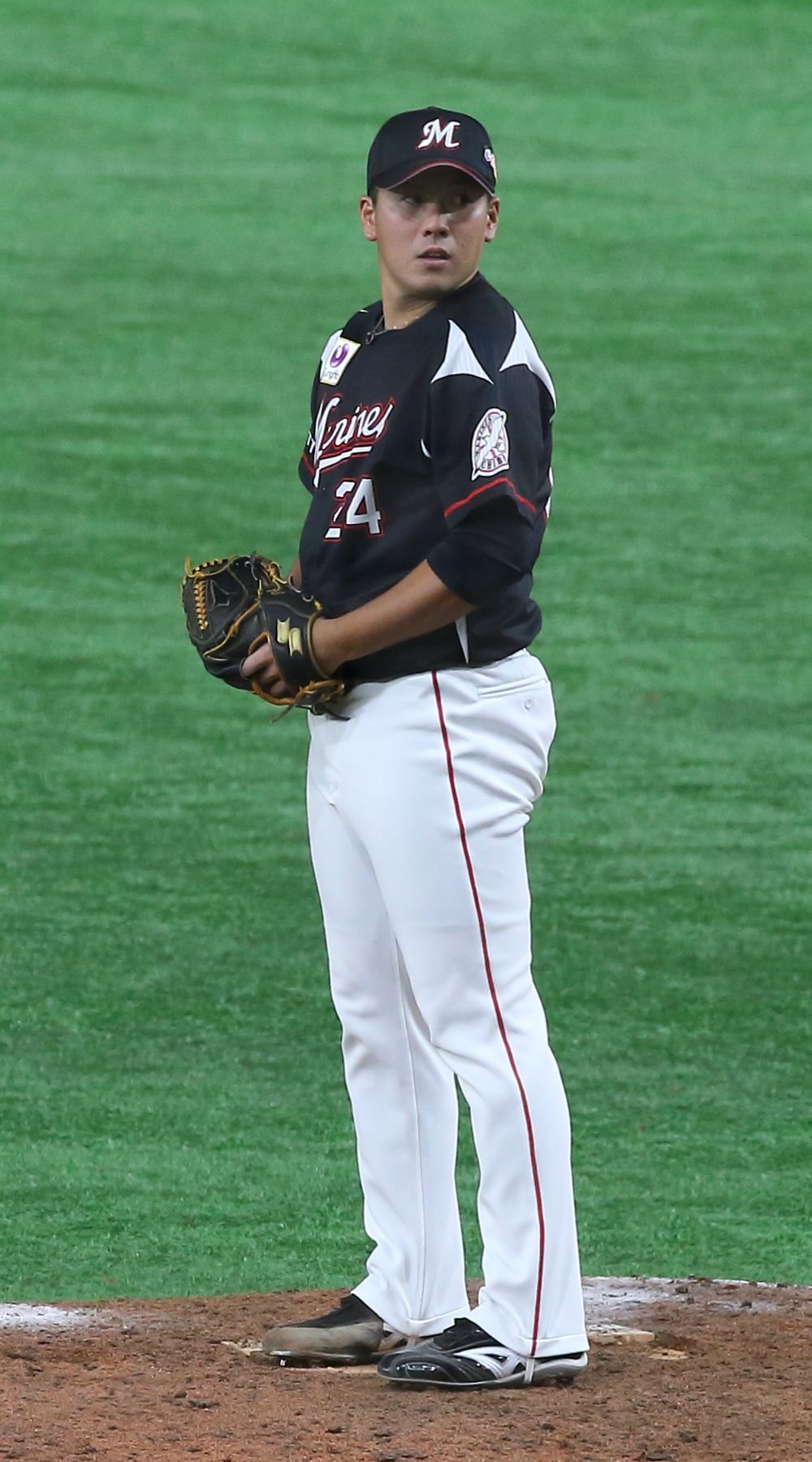 千葉ロッテマリーンズの東妻勇輔選手。2019年8月14日に東京ドームで撮影。